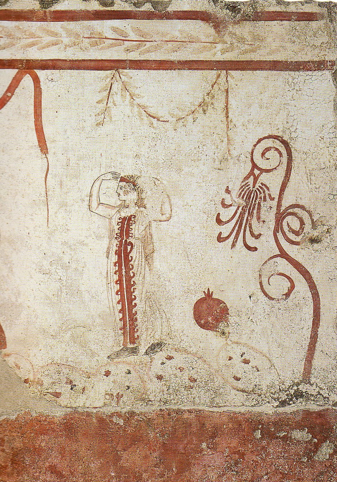 Paestum, Grab der Klagefrauen. Detail